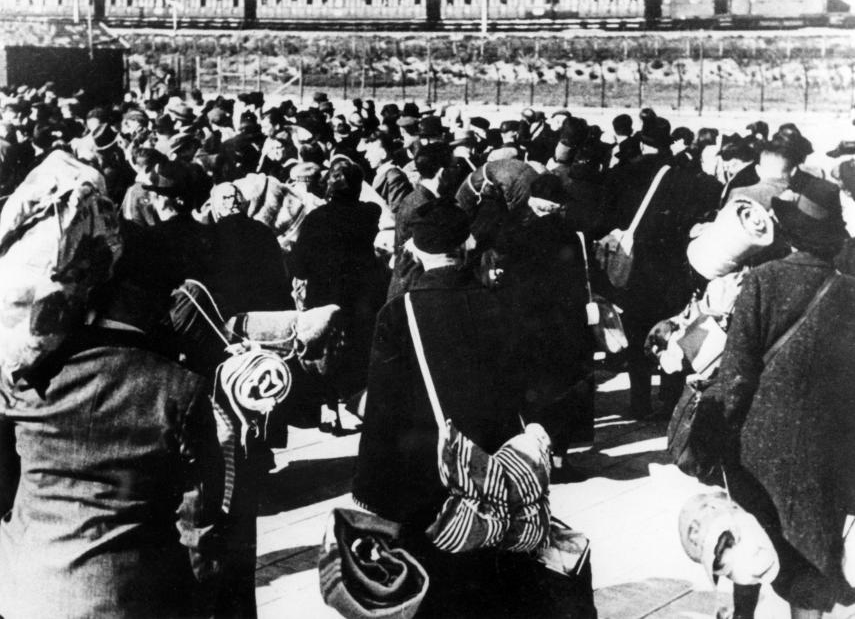 Vertrek Joden uit Amsterdam naar Westerbork, Nederland 1943-1945.